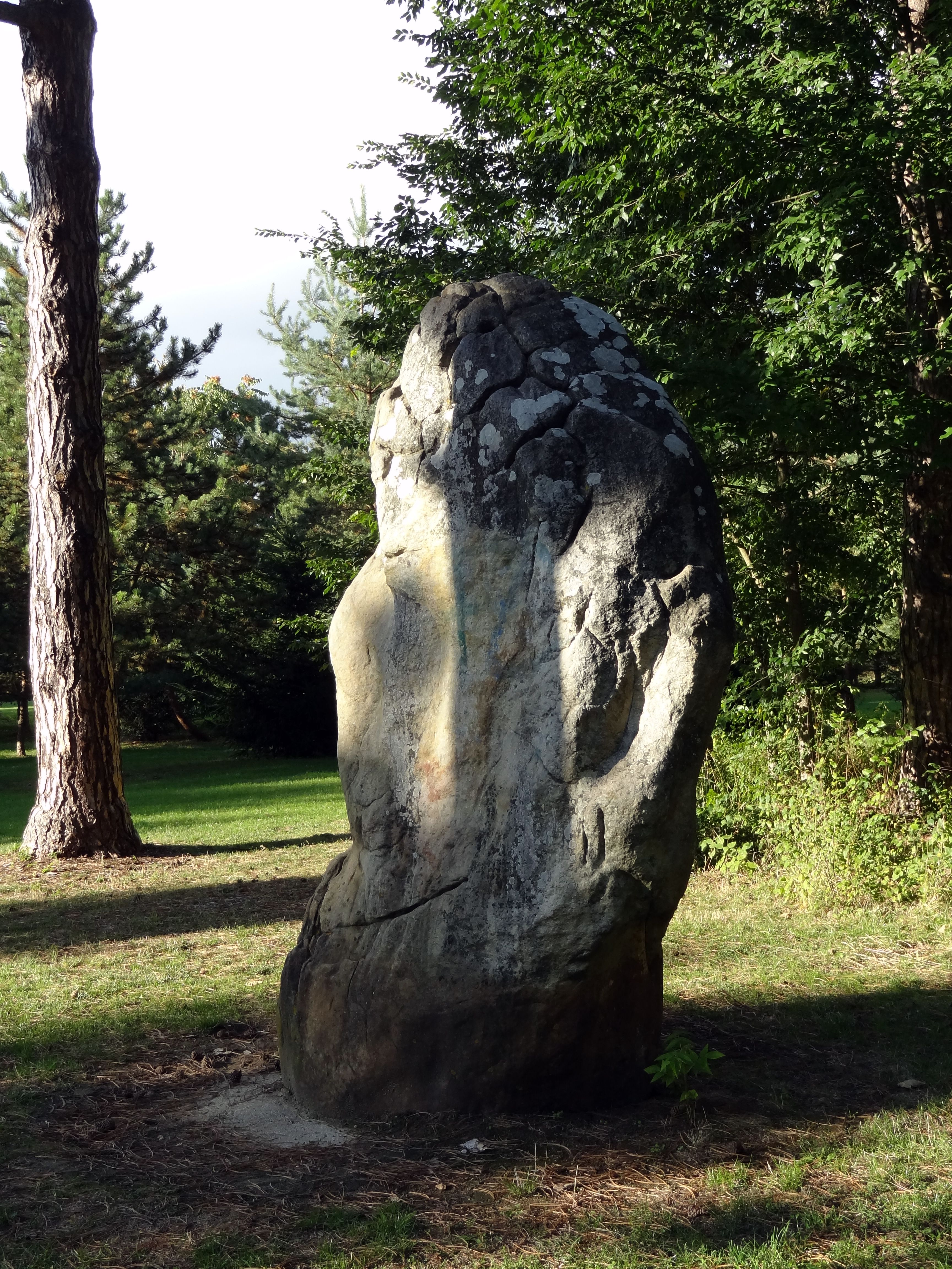 Menhir dit La Pierre à Mousseaux .